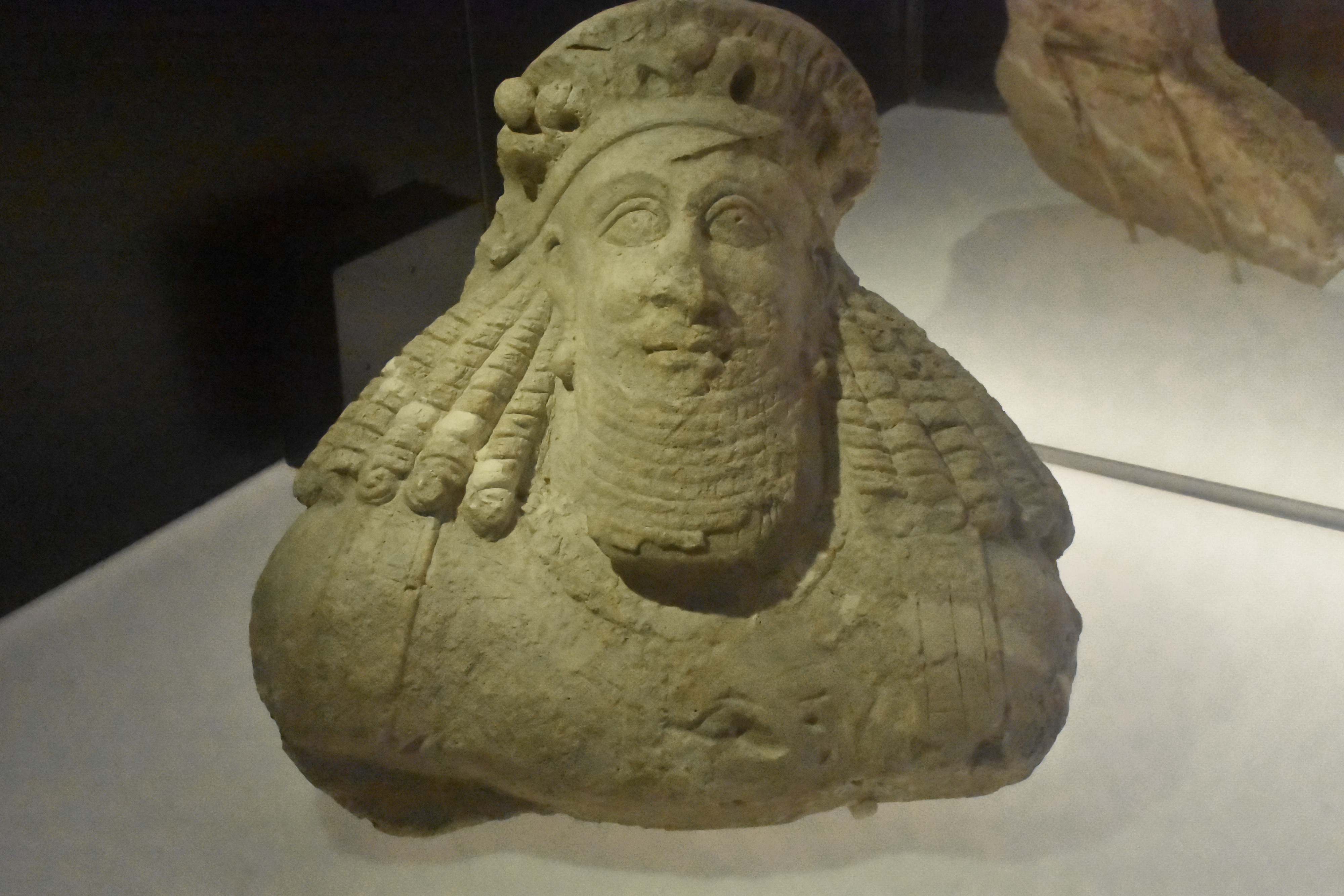 Busto de piedra de pesonaje masculino. Período sasánida. 224-651 d. C. Procedencia: Hajjiabad, Irán. Forma parte de la exposición Irán, cuna de civilizaciones en el MARQ. Se exhibe en el Museo Nacional de Irán.